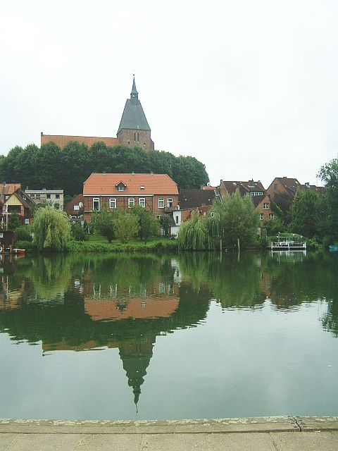 Blick auf die Möllner Altstadt vom gegeüberliegenden Ufer des Stadtsees aus